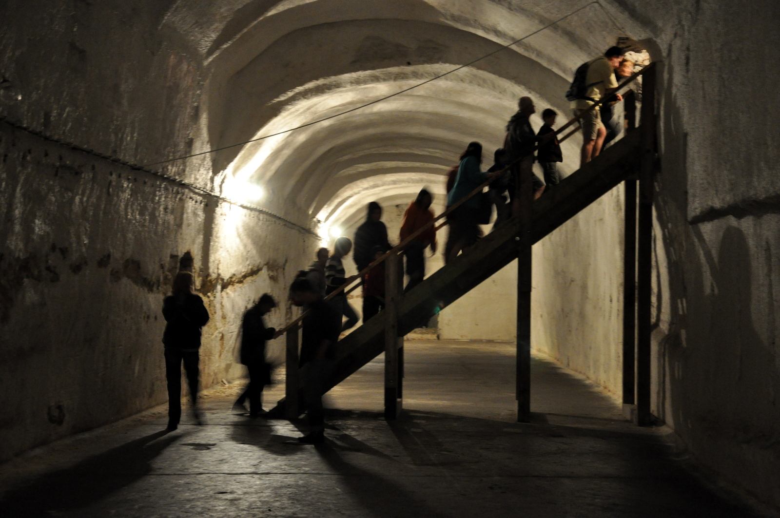 Kőbánya limestone mine, exit to the